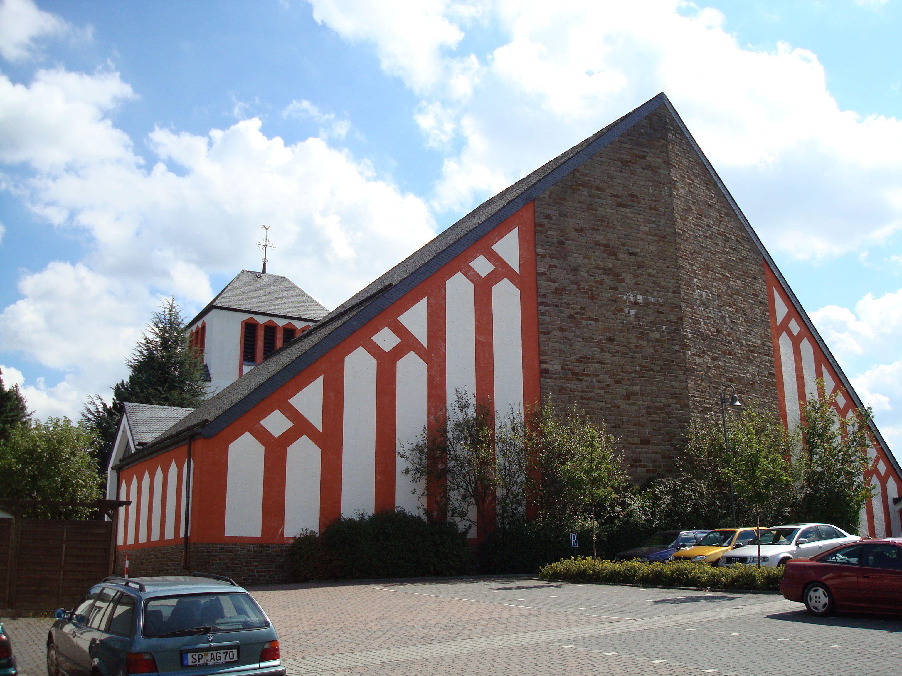 St. Hildegard (Emmelshausen) von Westen